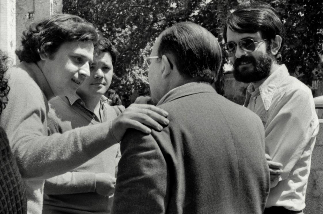 Abril de 1.981, aplec a Xàtiva. Aquesta fotografia s'ha publicat en: Programa Plaerdemavida, À punt, 06-08-2018, minut 25:24